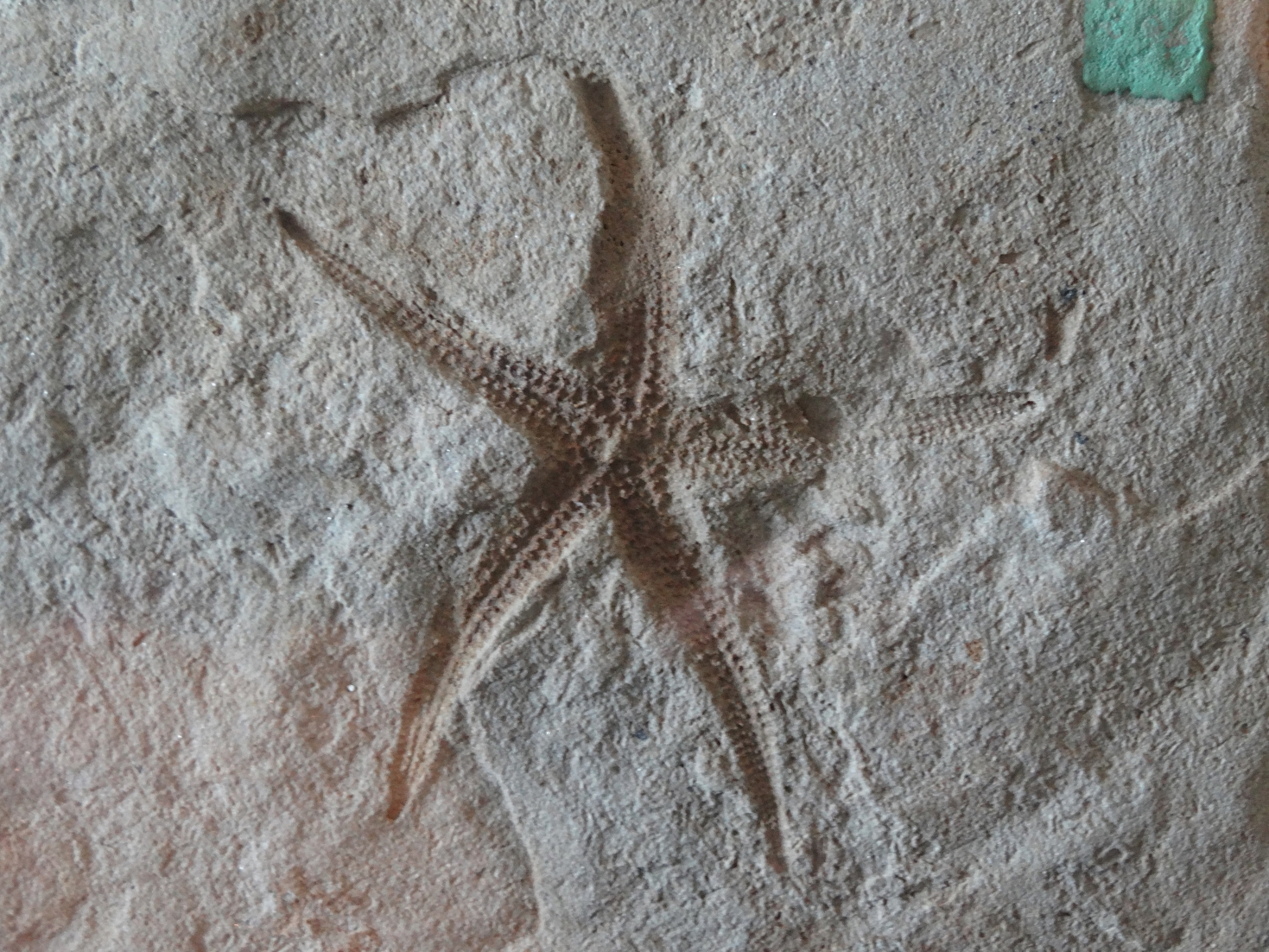 Seestern Pentasteria sp. aus dem Schwarzen Jura der Fränkischen Alb; Fundort nahe Bad Staffelstein /Oberfranken; Exponat in der Petrefaktensammlung Kloster Banz